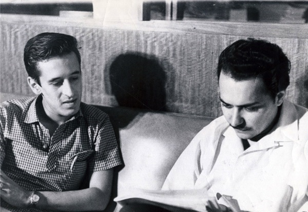 El periodista salvadoreño Roque Dalton junto al pintor cubano Fayad Jamís, en la sala de redacción del periódico Hoy en 1962.